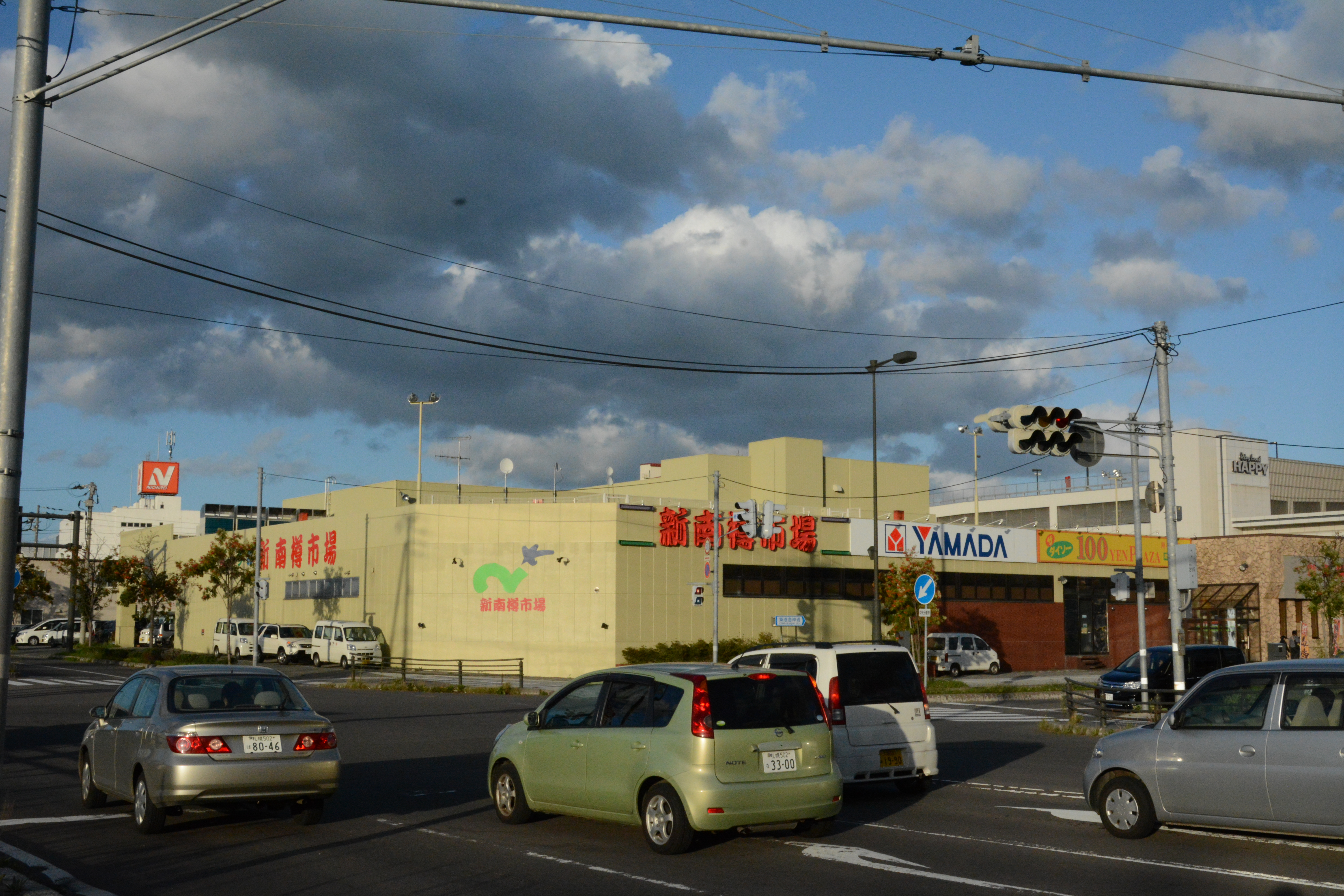 新南樽市場外観